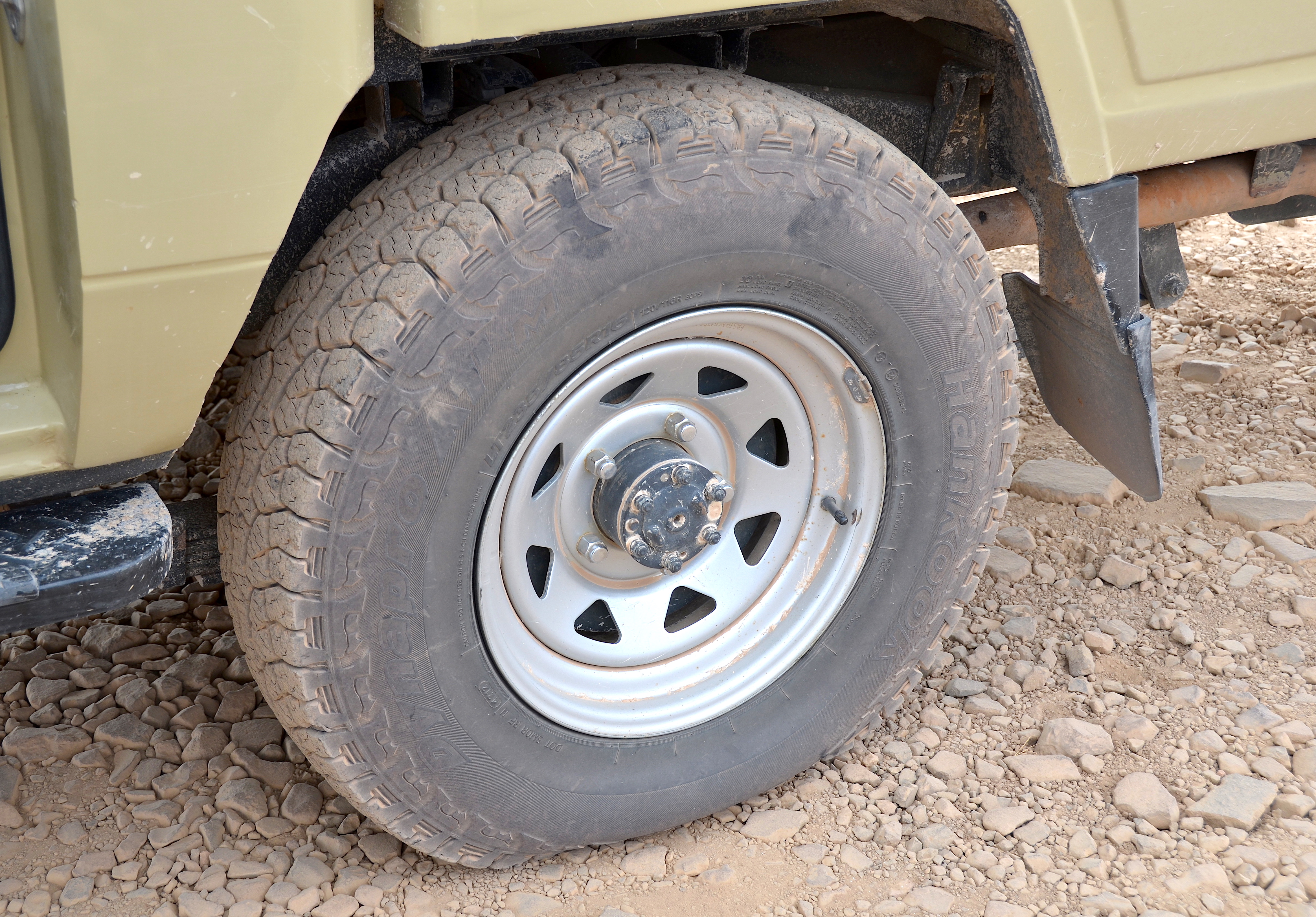 Reifenpanne eines Geländefahrzeugs in der Namib Wüste